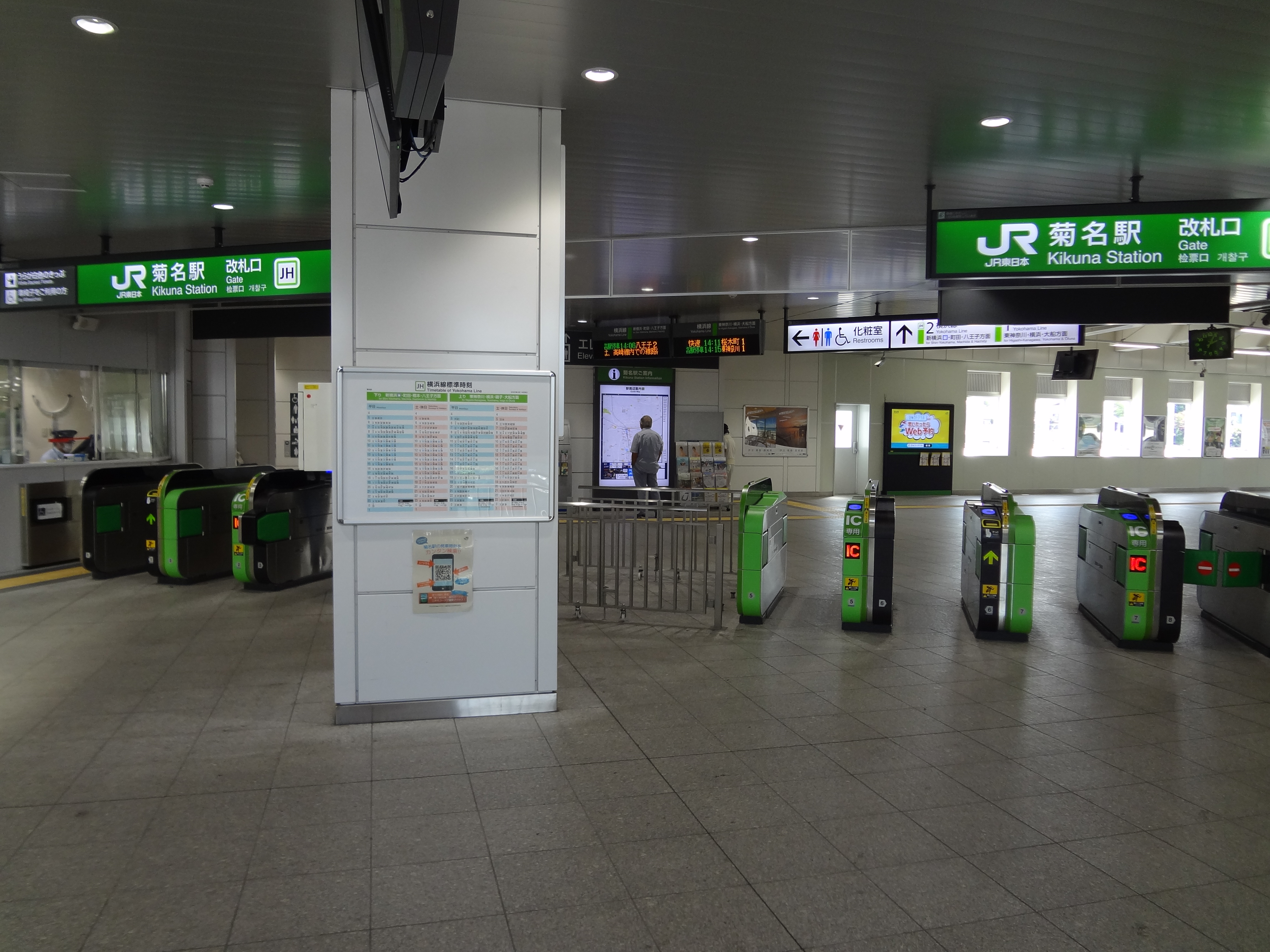 菊名駅ＪＲ改札口